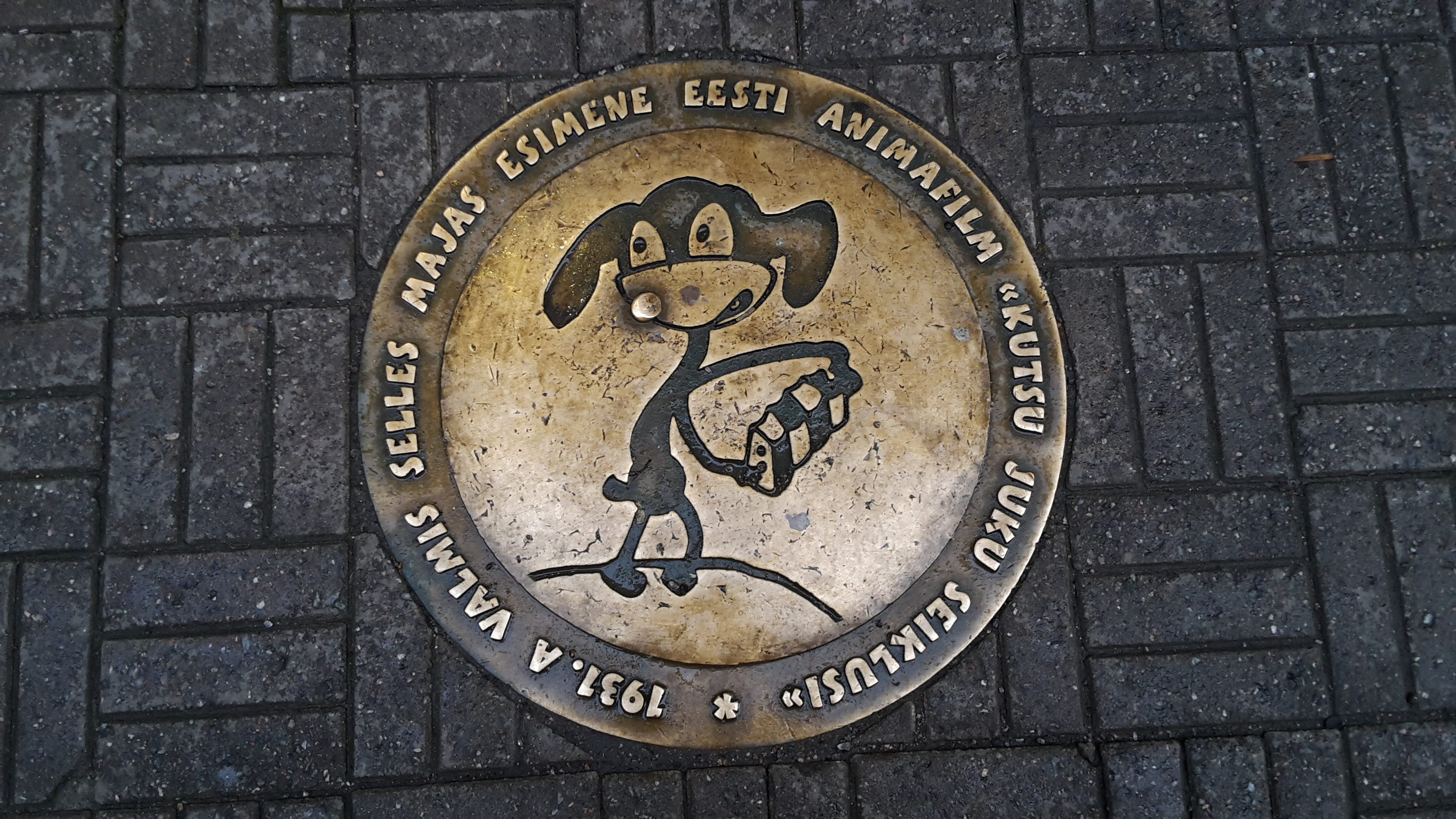 Gedenkplakette auf dem Pflaster in der Tallinner Altstadt vor dem Haus Suur-Karja 9 zur Erinnerung an den ersten estnischen Trickfilm. Die Inschrift in estnischer Sprache lautet: "1931. A VALMIS SELLES MAJA ESIMENE EESTI ANIMAFILM 'KUTSU JUKU SEIKLUSI'" ("Im Jahr 1931 wurde in diesem Haus der erste estnische Trickfilm 'Die Abenteuer des Hündchens Juku' hergestellt")